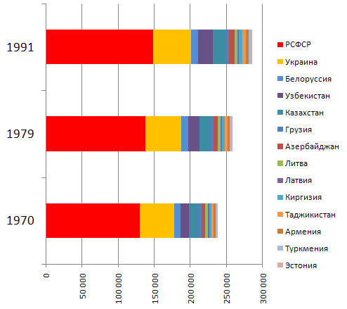 Численность населения СССР по республикам (график)в 1970,1979 и 1991 гг.